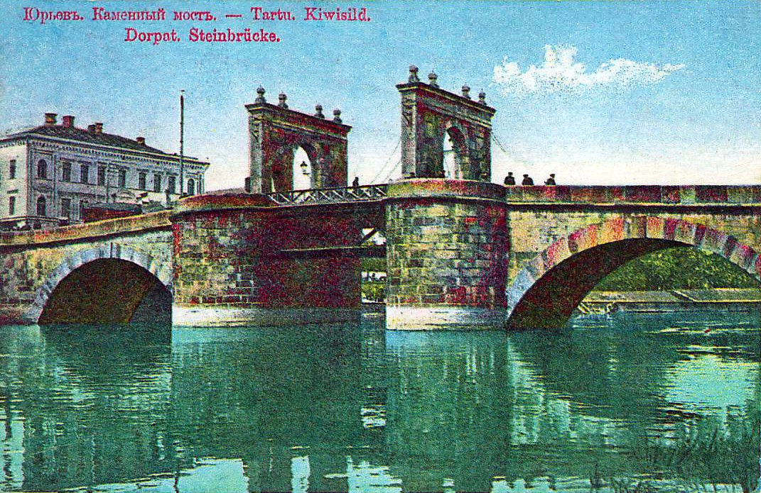 Kivisild Tartus